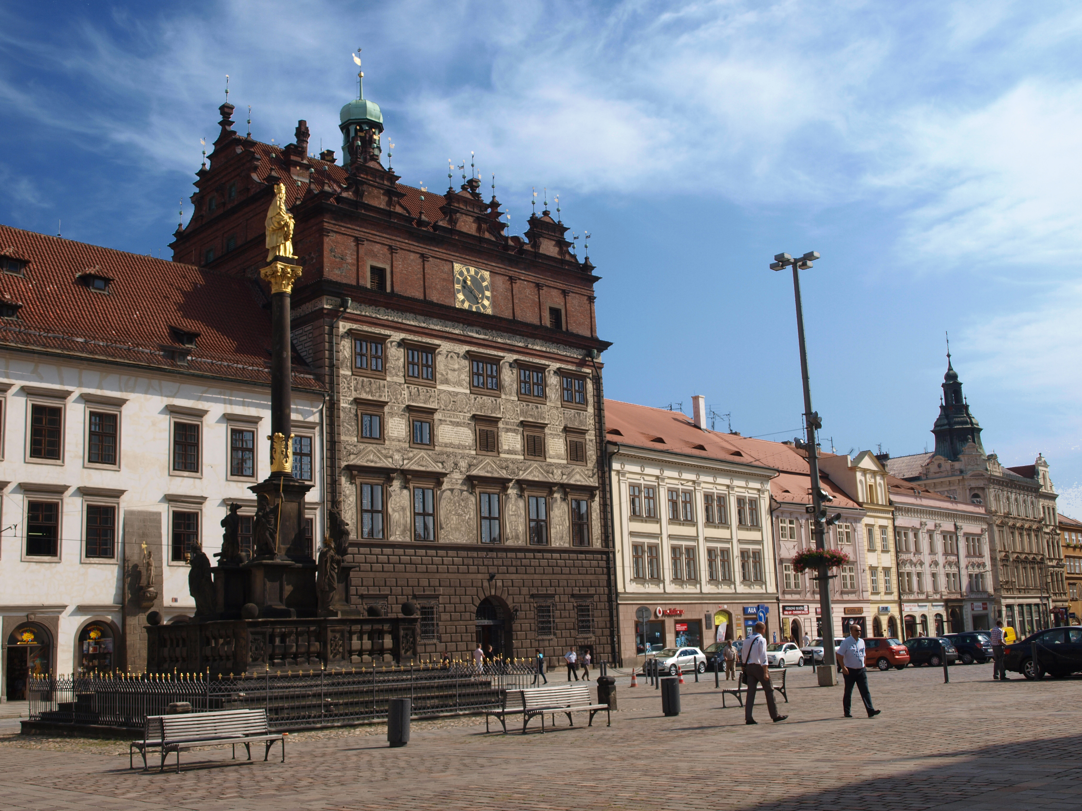 Radnice náměstí Republiky, Plzeň Číslo rejstříku ÚSKP: 19932/4-154